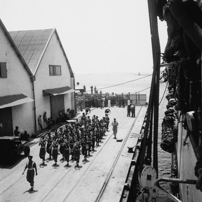 negatief. Militaire blaaskapel op de kade in de haven van Tandjong Priok, bij het vertrek van het troepenschip ms. Kota Inten naar Nederland